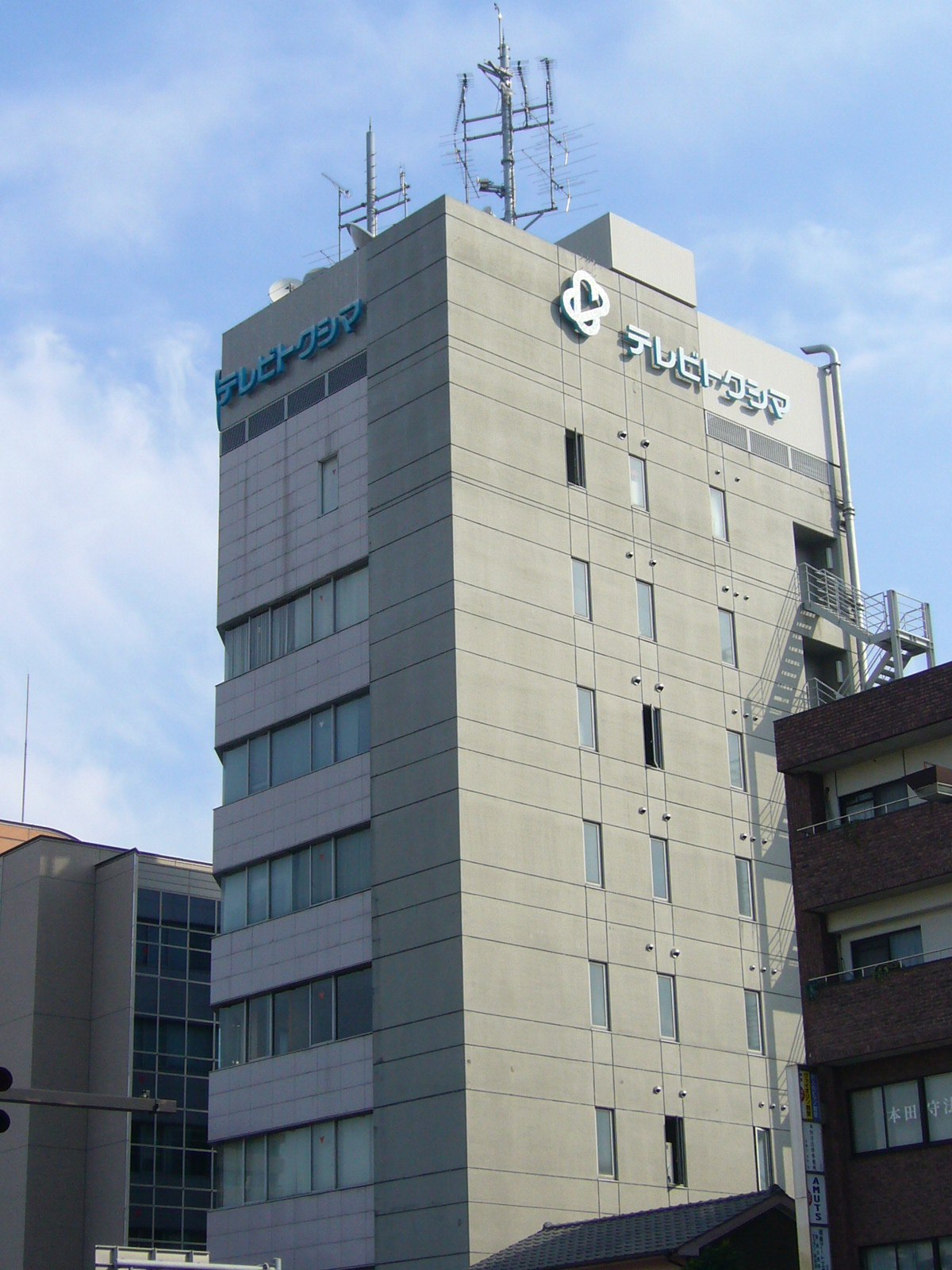 ケーブルテレビ徳島株式会社本社